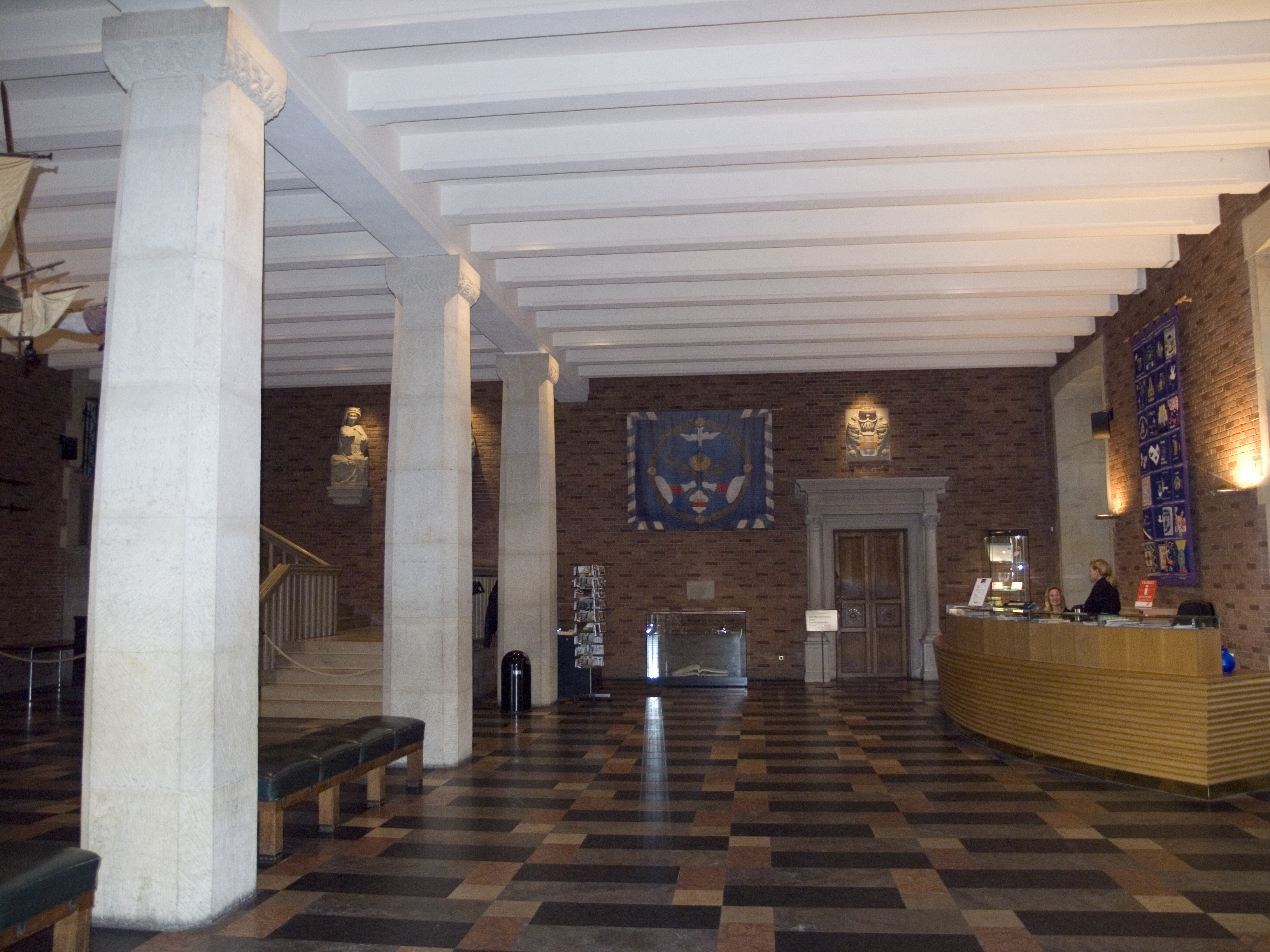 Северный Рейн - Вестфалия, Мюнстер - историческая ратуша